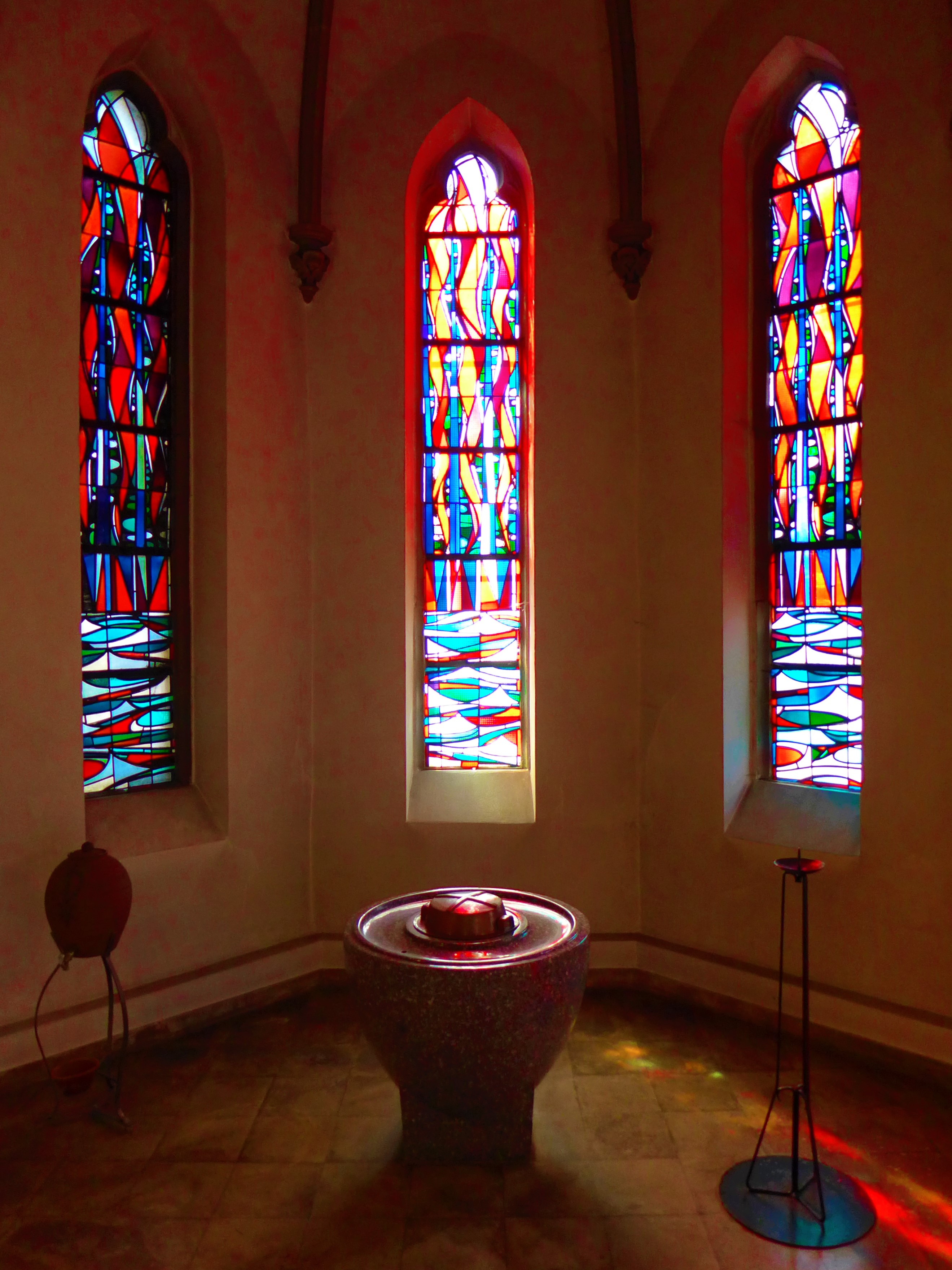 St. Josef (Saarbrücken), Taufkapelle